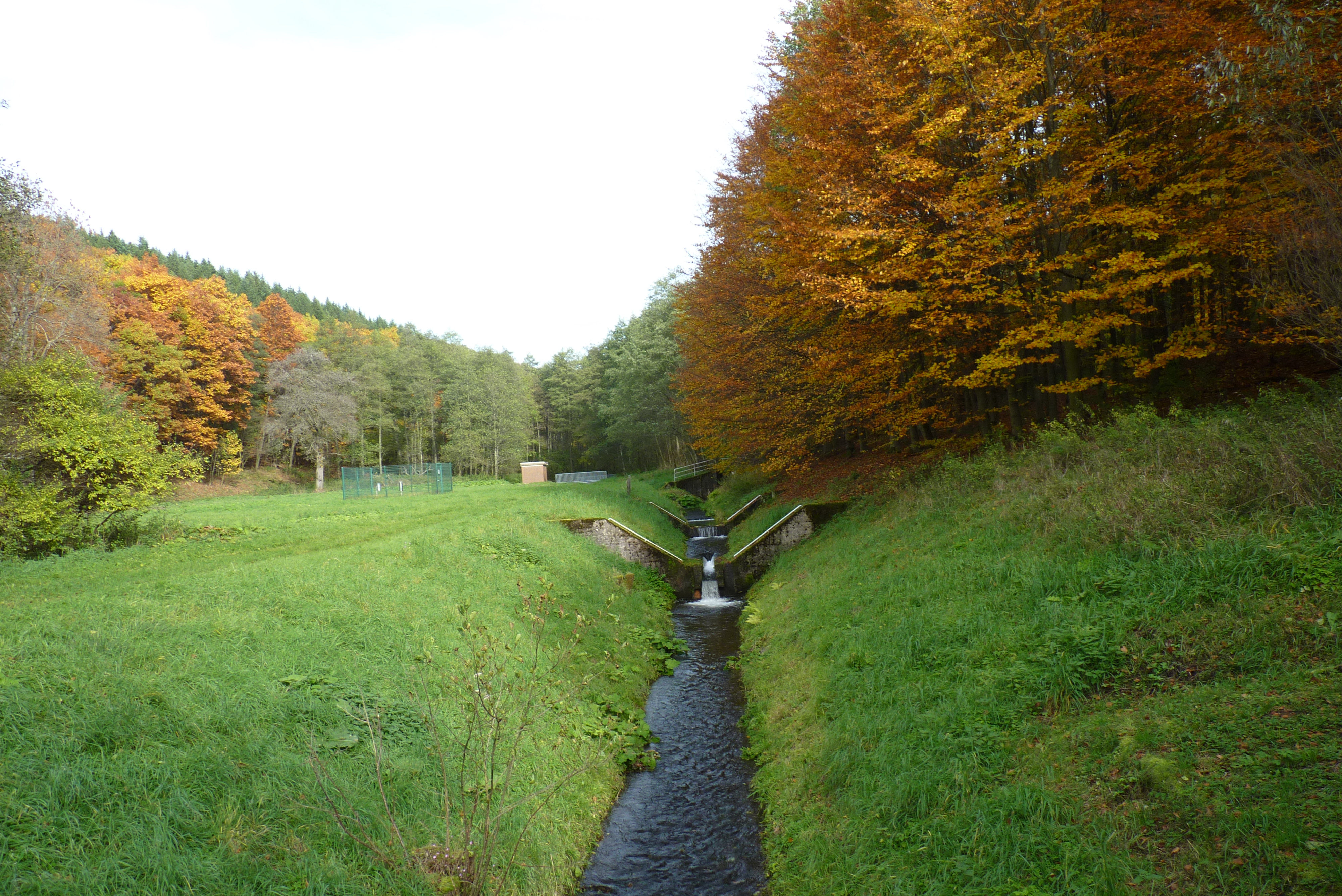 Der Nauholzbach m Oktober 2013 kurz vor der Mündung